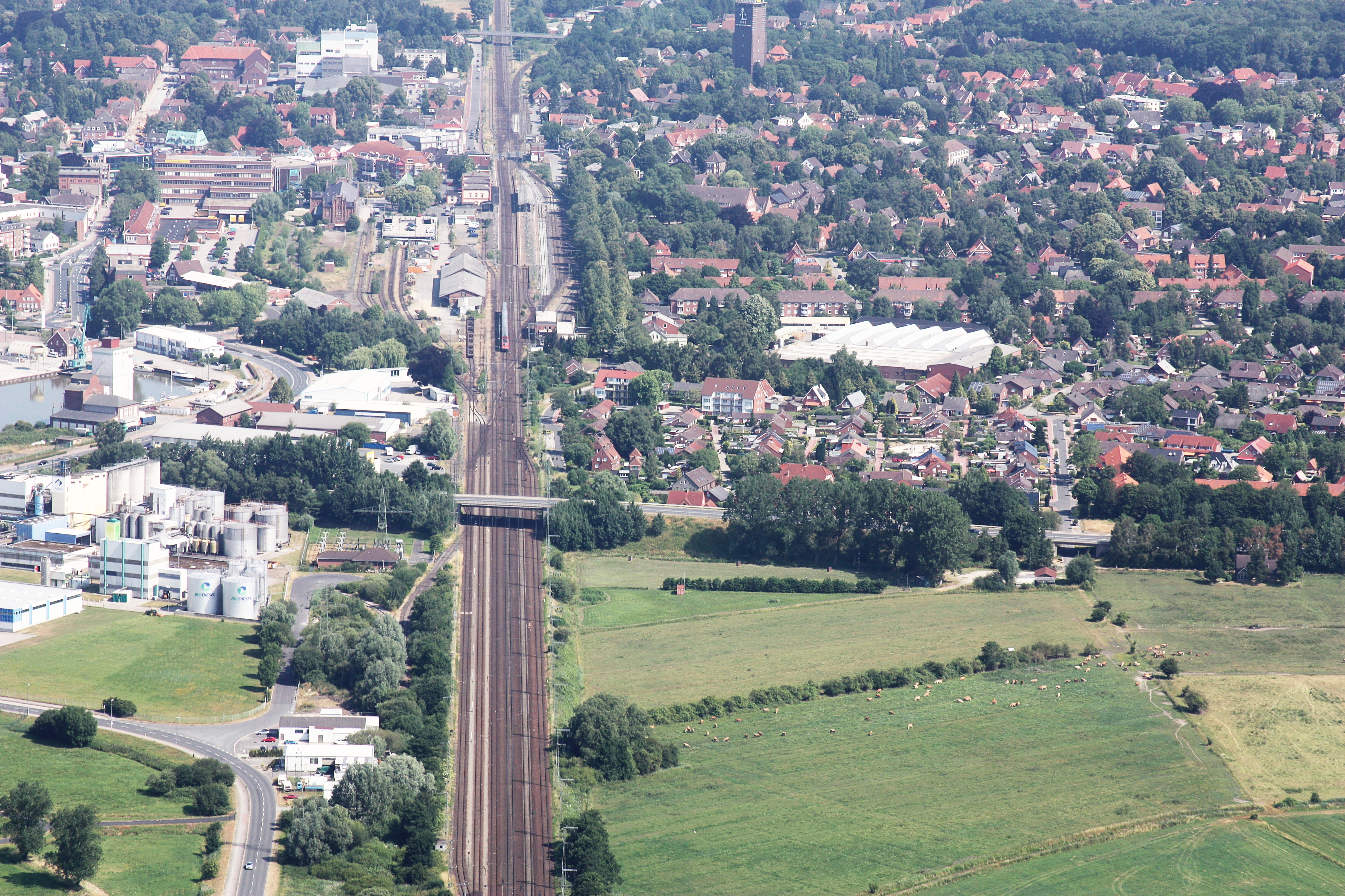 Luftaufnahme; Flug von Westerstede nach Leer; Flughöhe 1500 ft; Juli 2010; Originalfoto bearbeitet: Tonwertkorrektur und Bild geschärft mit Hochpassfilter